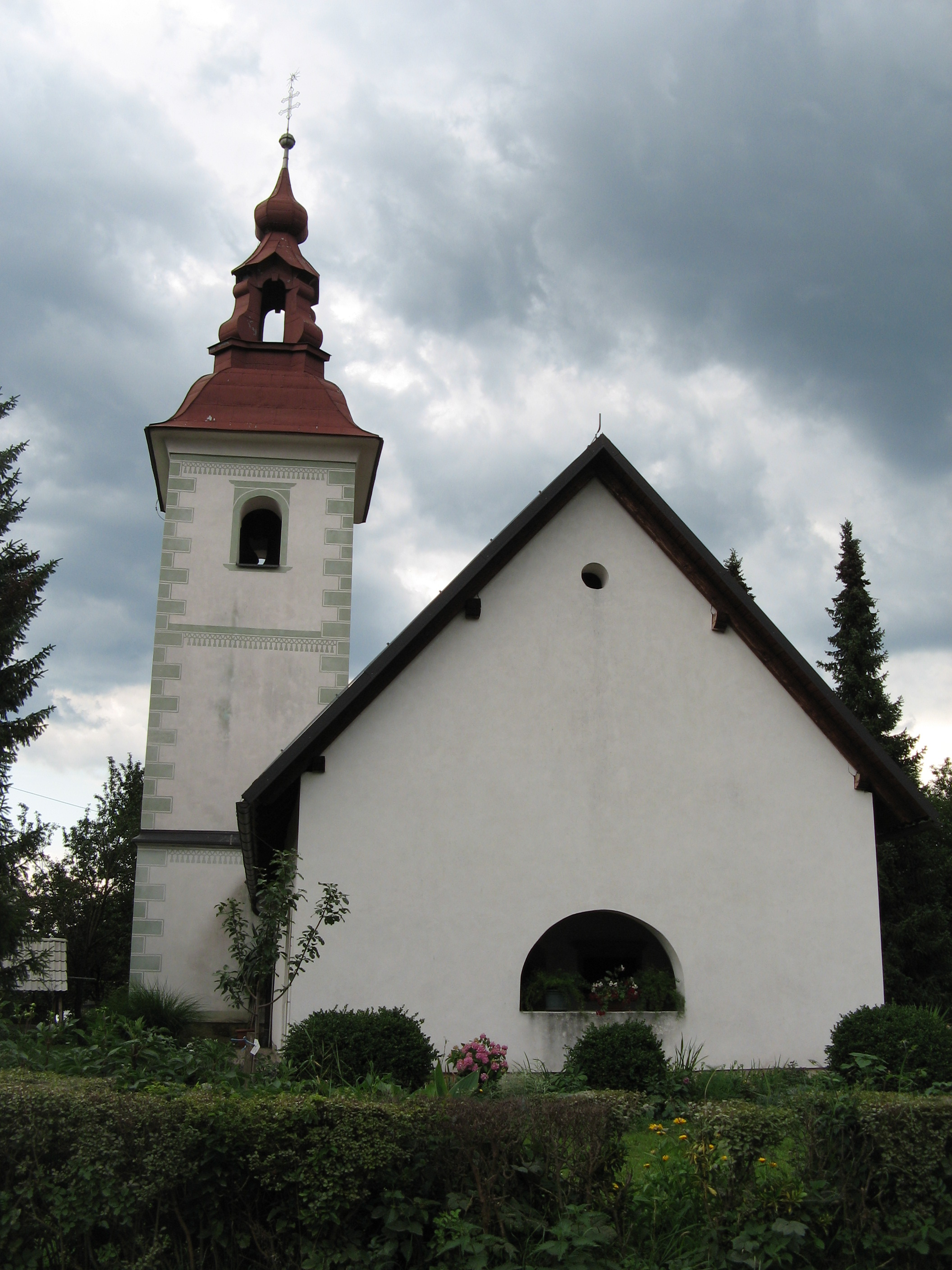 Cerkev sv. Radegunde, Breg (občina Žirovnica)